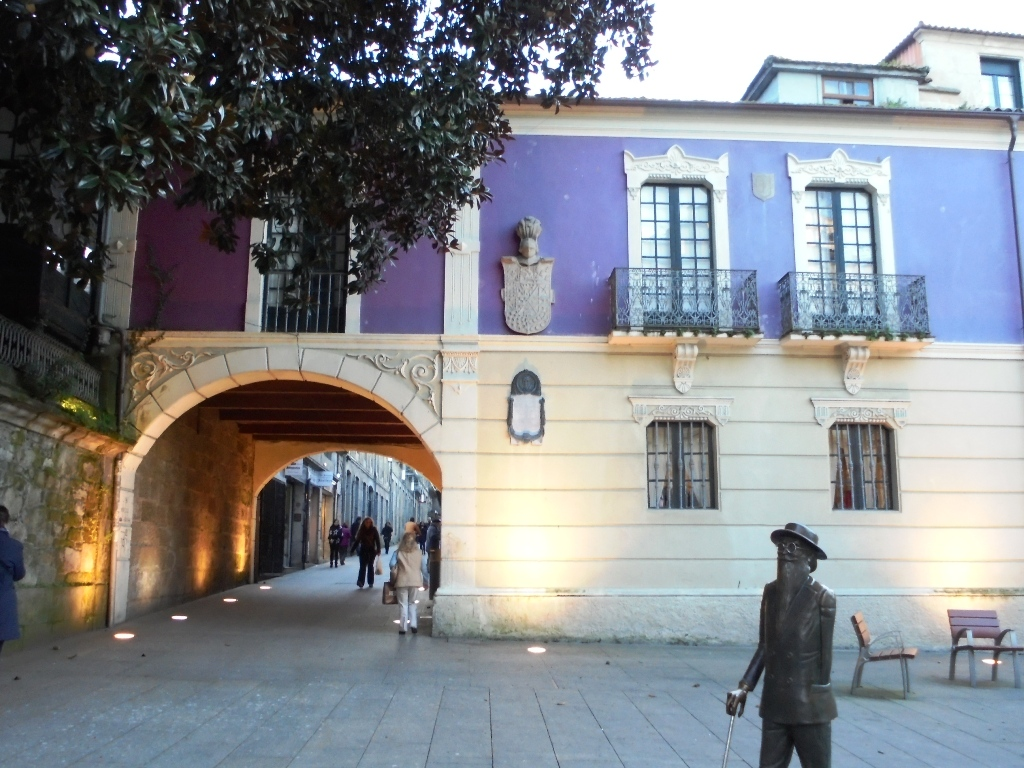 Plaza Méndez Núñez Arco y Valle-Inclán